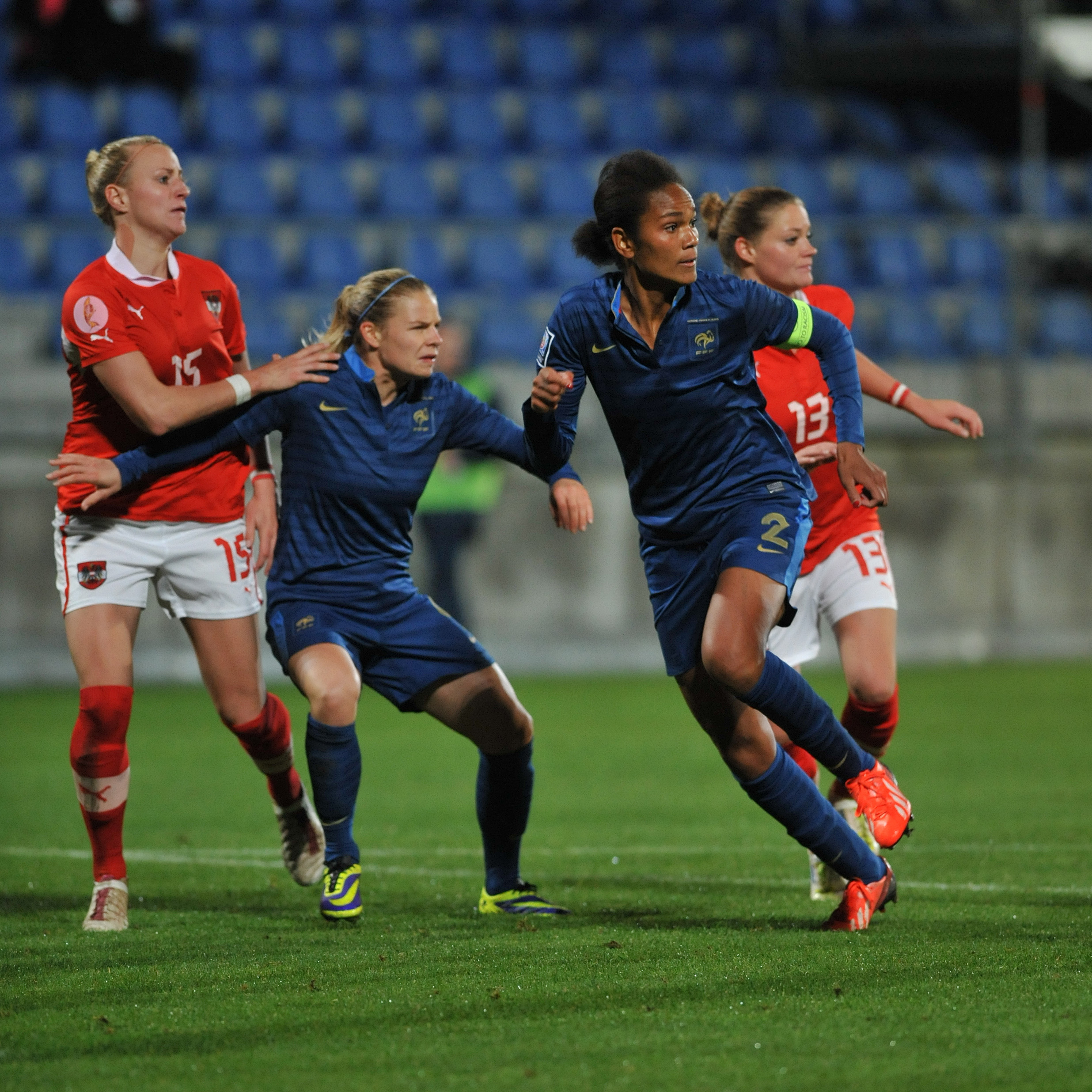 FIFA Women's World Cup 2015 Qualiying Round Österreich - Frankreich am 31. Oktober 2013 in Ritzing: Wendie Renard